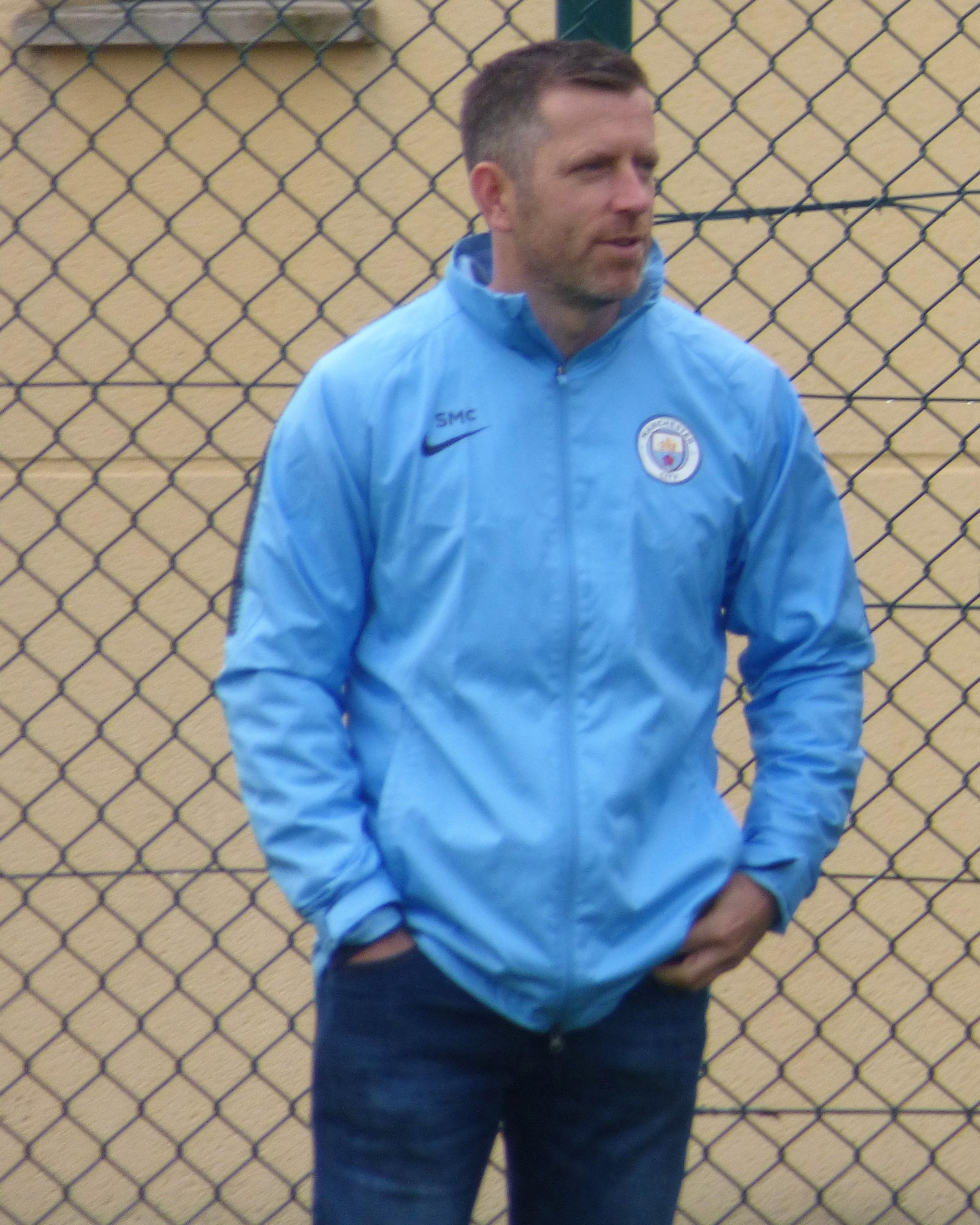 Jason Wilcox lors d'un entraînement public du Racing Club de Lens, le 13 septembre 2018, au Centre technique et sportif de La Gaillette à Avion.